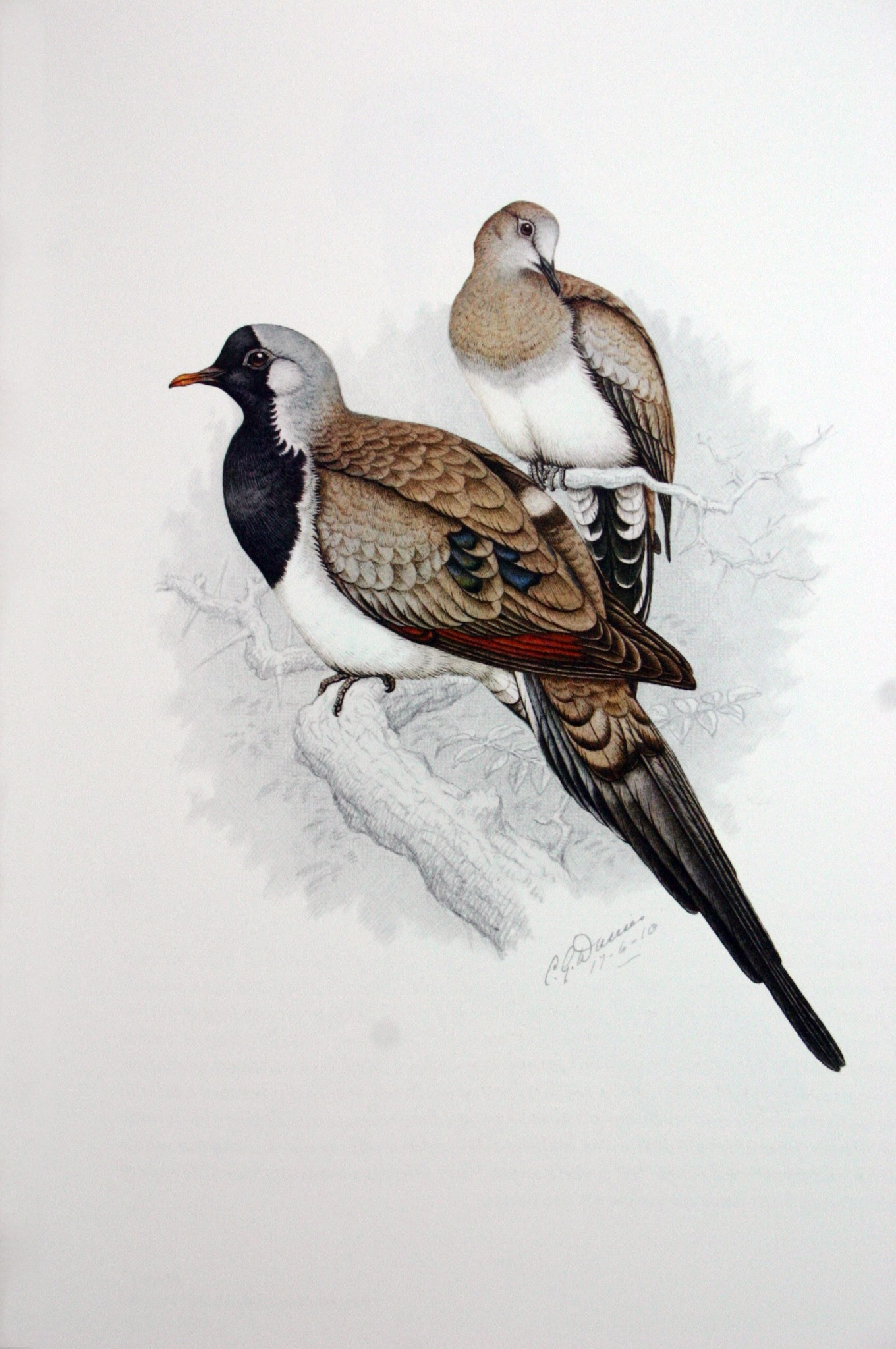 Namaqua Dove (Oena capensis)